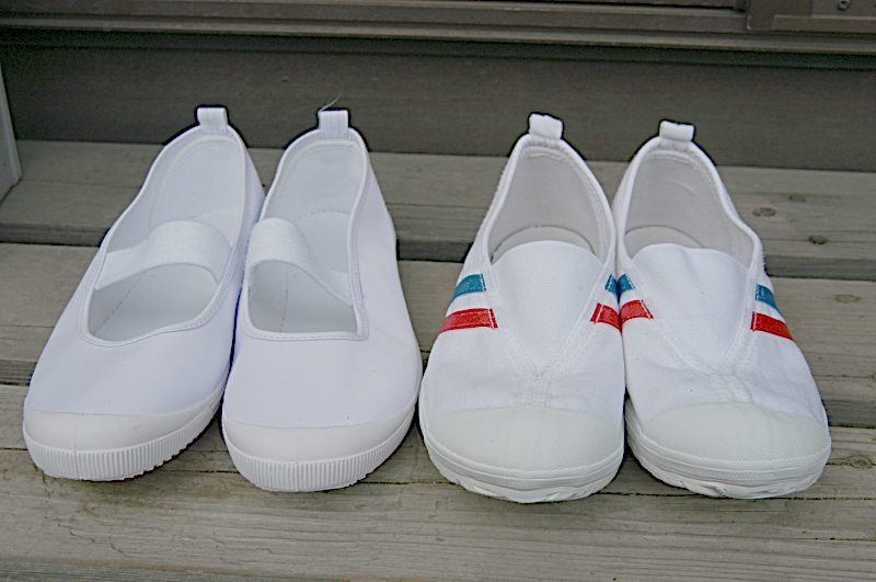 Imagens dos sapatos japoneses uwabaki.